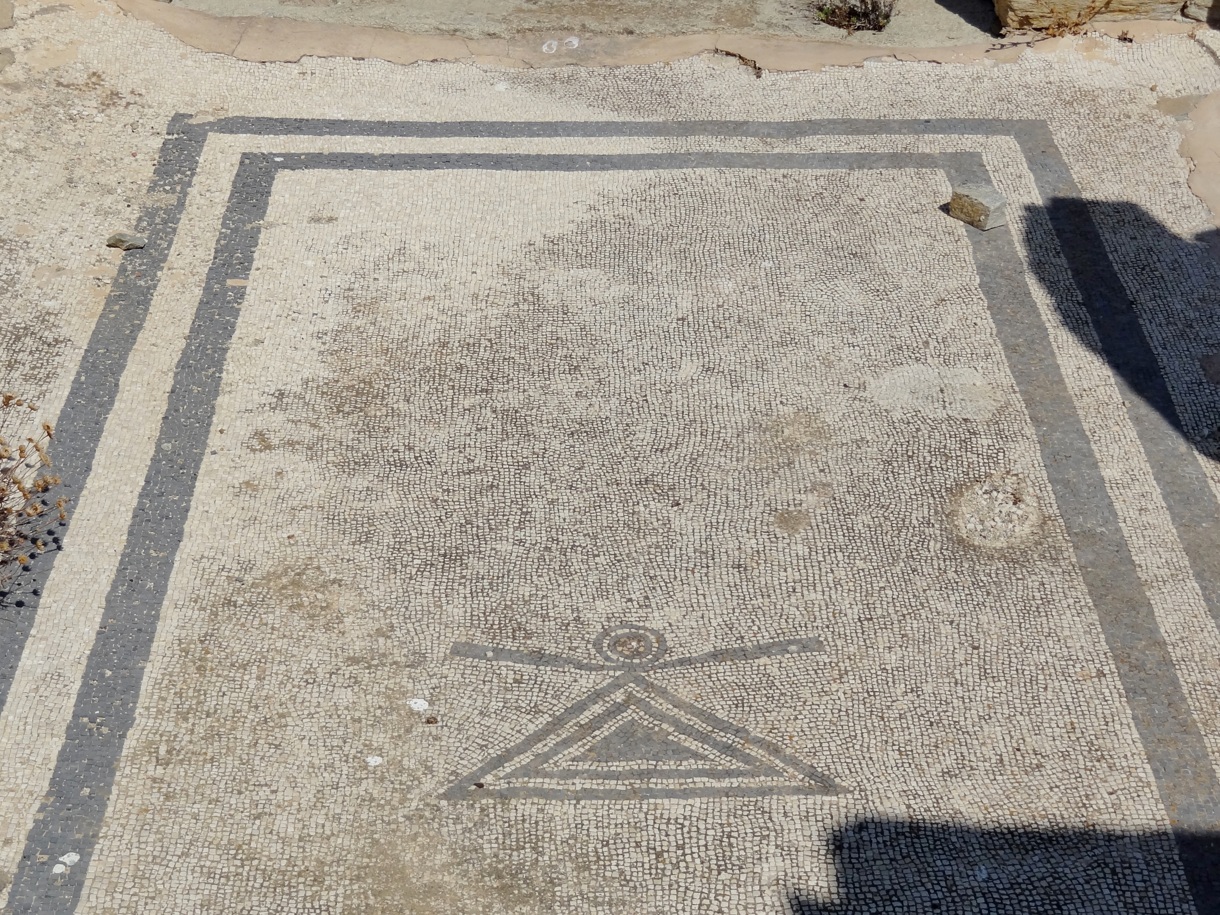 Haus der Delfine auf Delos, Kykladen, Griechenland